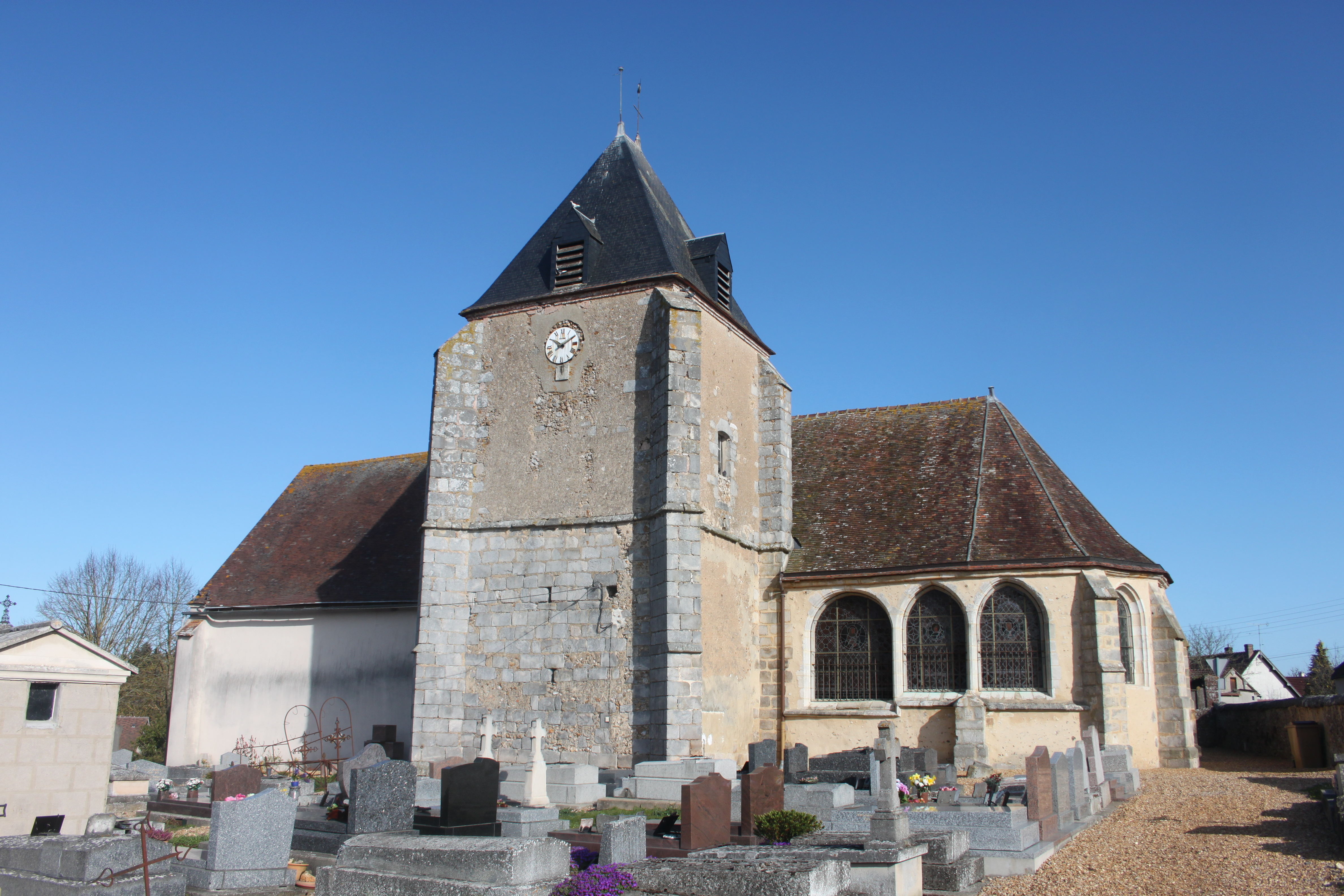 Eglise Saint-Martin Bouglainval